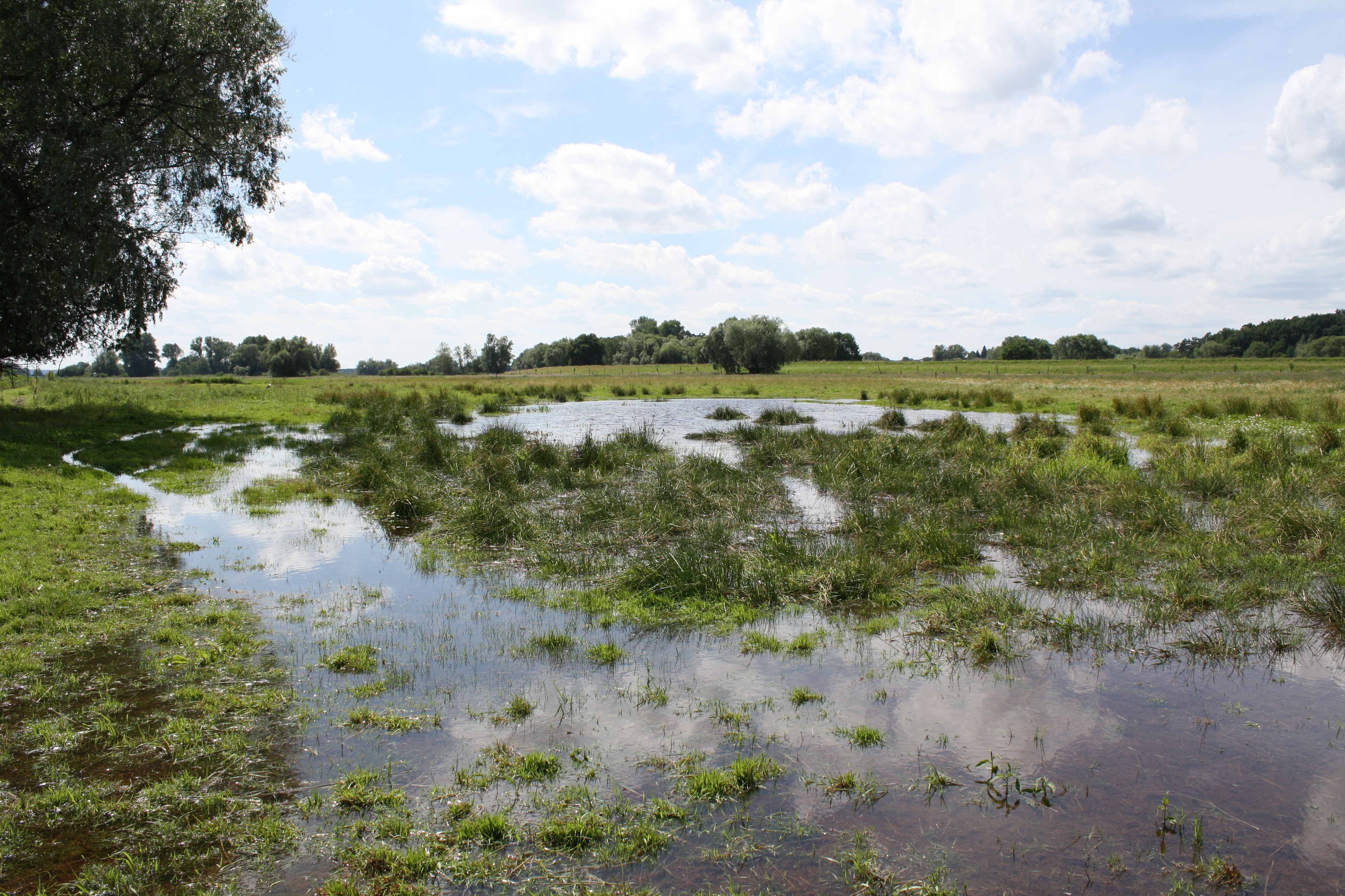 Feuchtwiese im Nationalpark Unteres Odertal